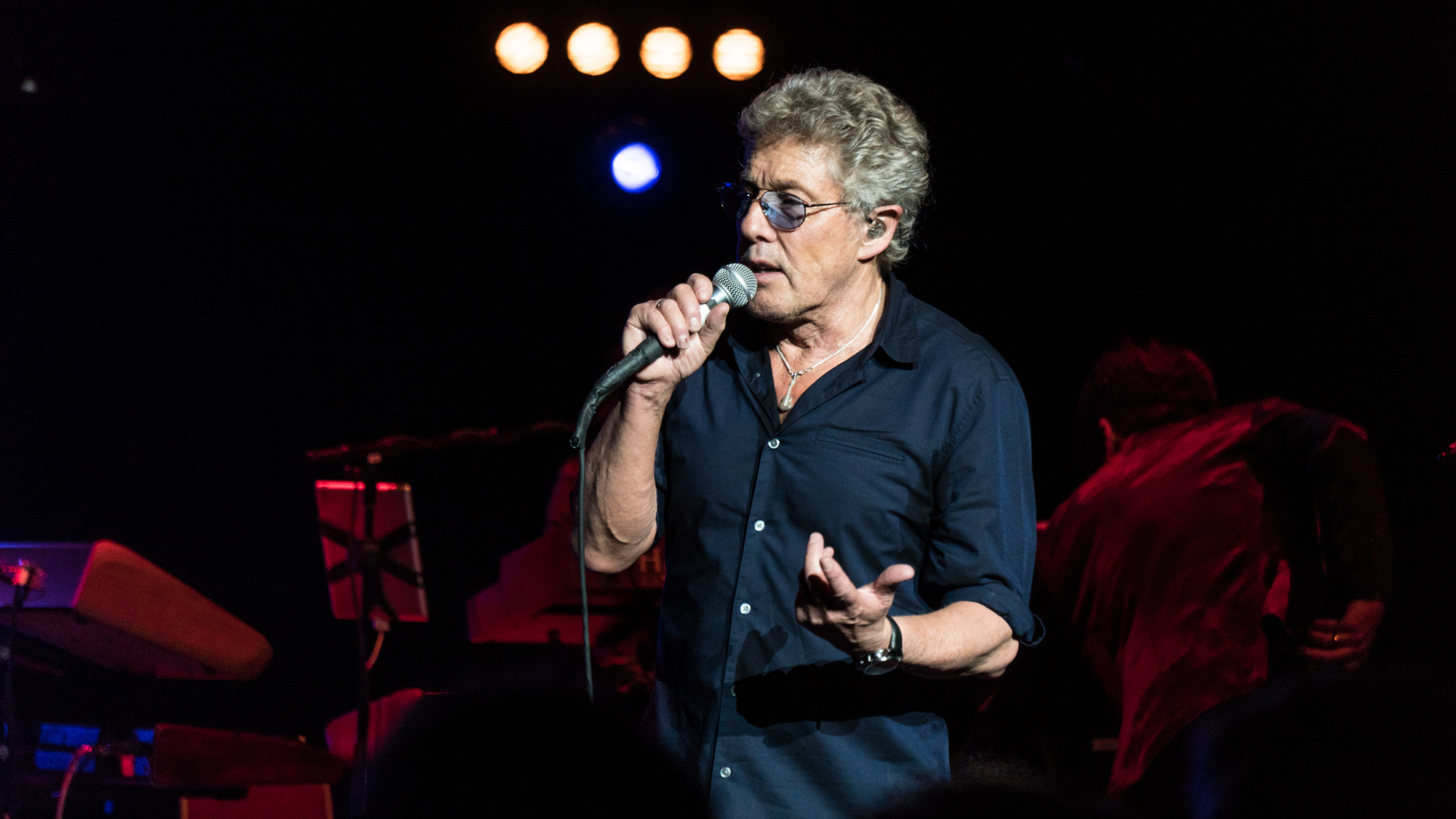 RogDaltreyRAH220318-46